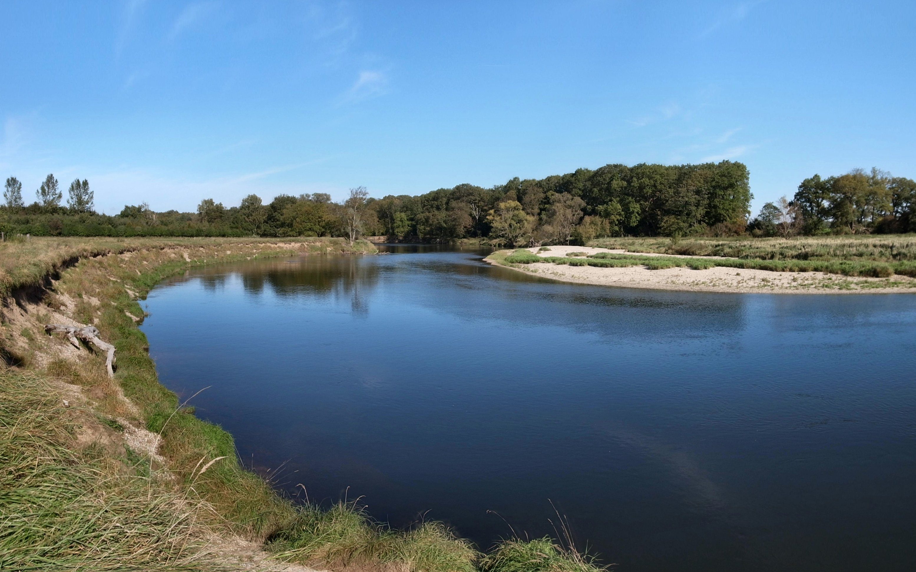 Der Fluss Mulde im Biosphärenreservat Mittelelbe mit Prallhang und Gleithang